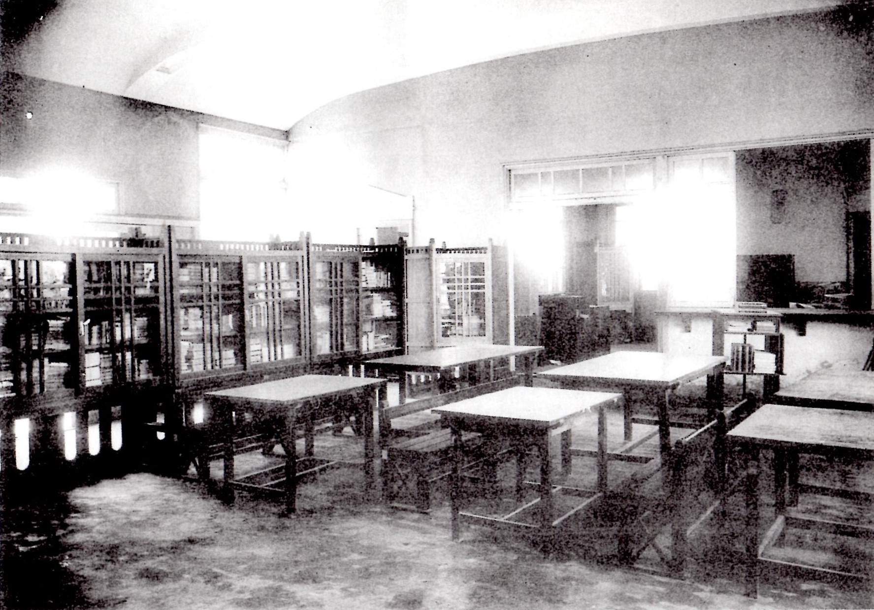 1927年に開館したばかりの津島町立図書館閲覧室の写真。愛知県海部郡津島町。